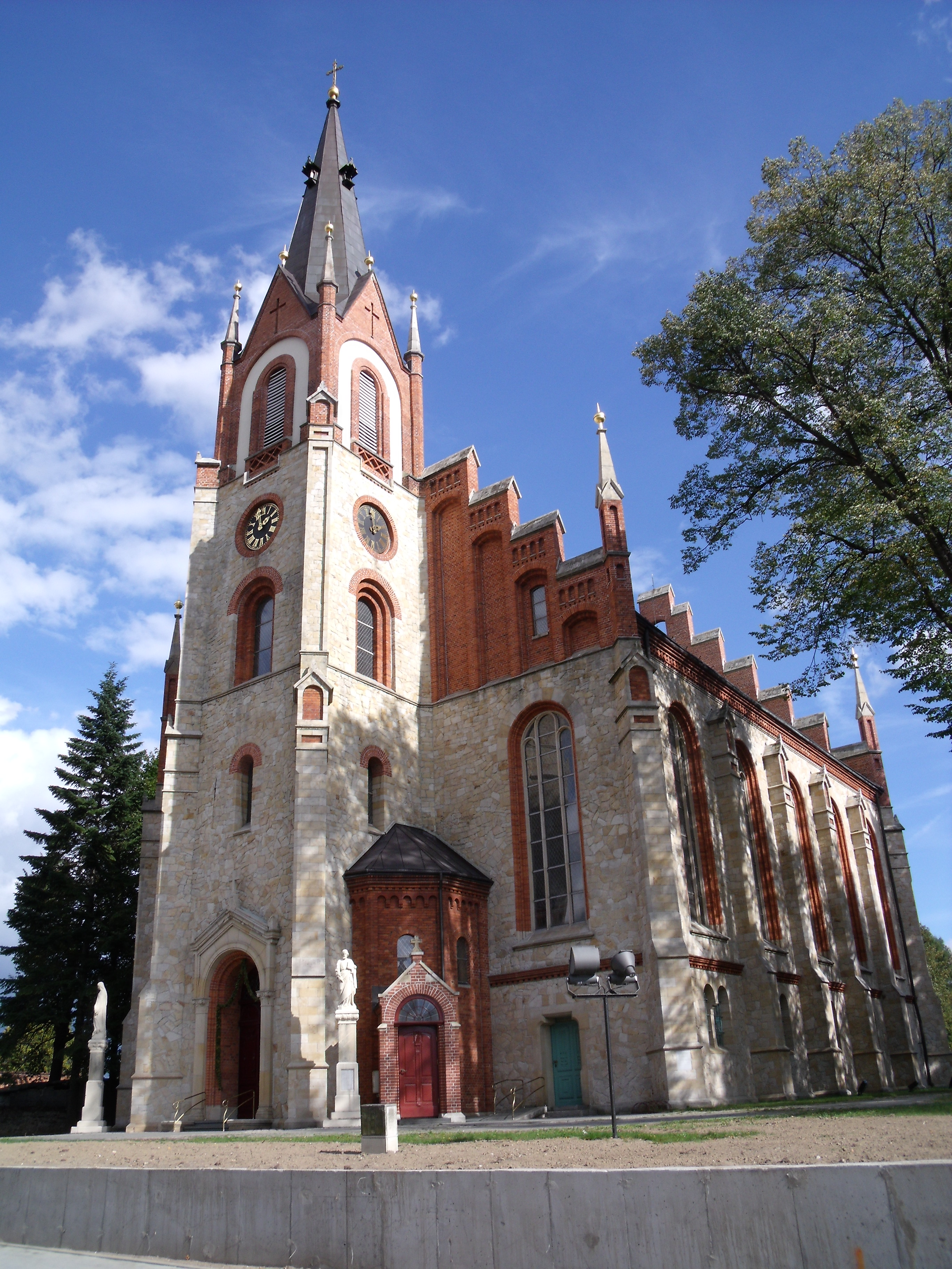 Orzesze Woszczyce, ul. Jana Długosza - zespół zabudowy kościoła p.w. Świętych Piotra i Pawła: kościół od frontu (zabytek nr A 219/07 z 30.10.2007)